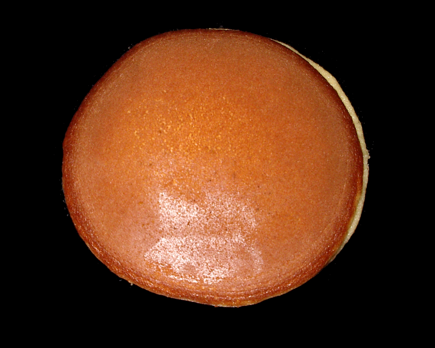 Dorayaki, a Japanese sweet.